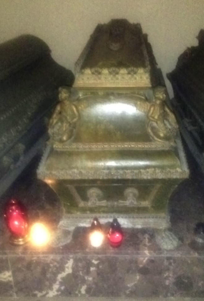 Sarkophag Florian Stablewski im Posener Dom (Krypta), zwischen J. Dinder (links) und E. Likowski (rechts)